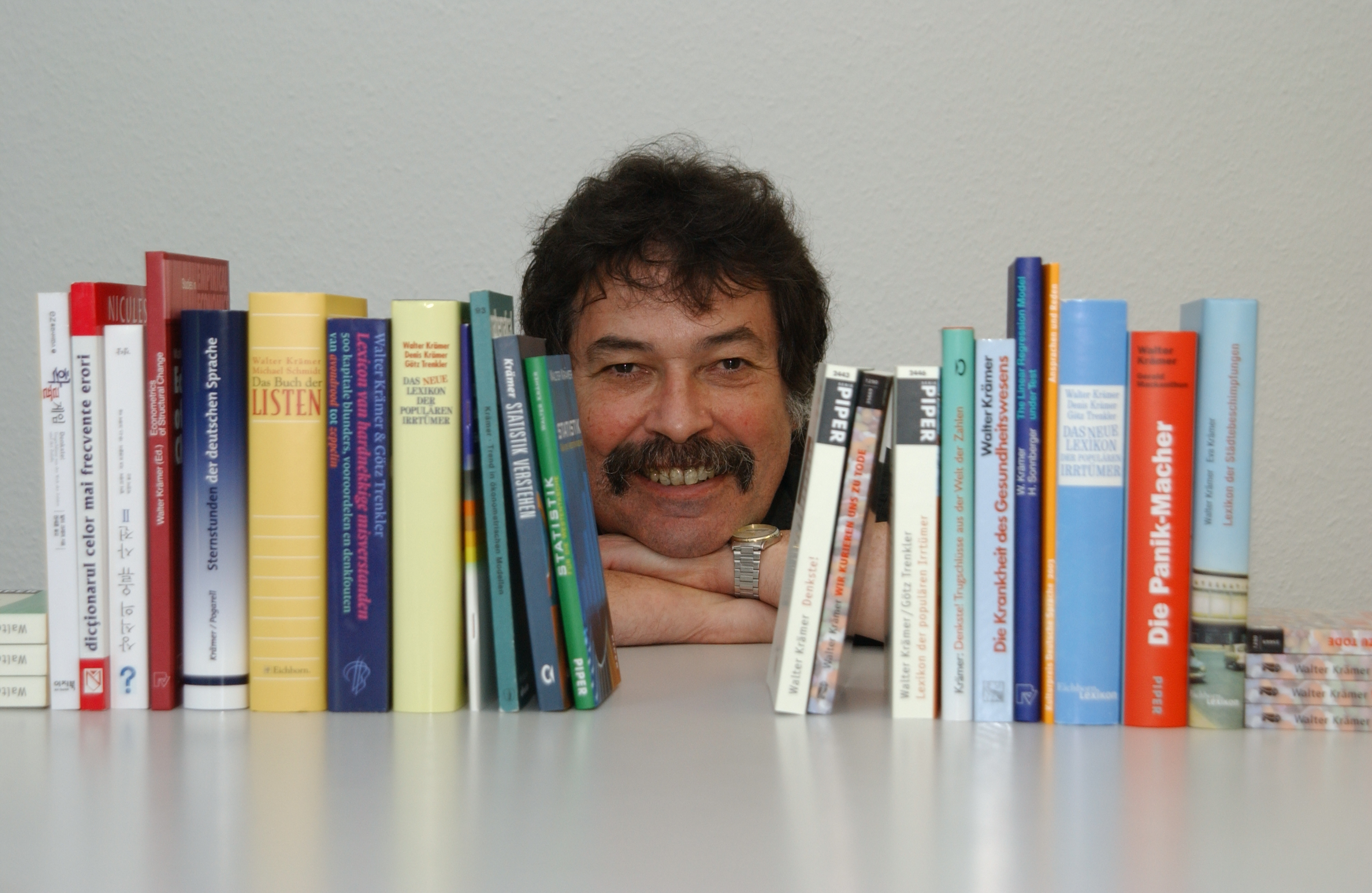 Walter Krämer